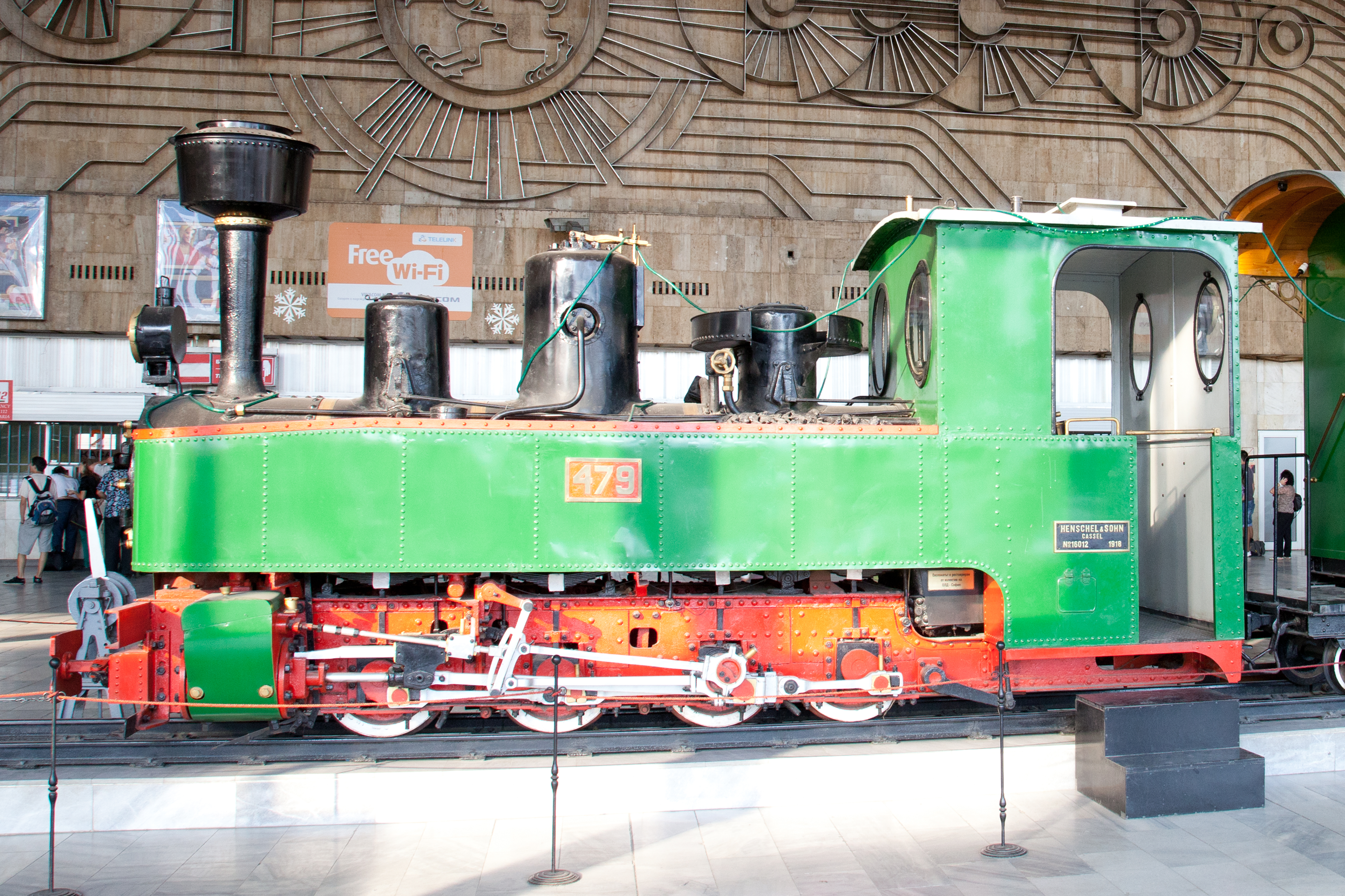 Sofia , Hauptbahnhof ; Bahnhofshalle mit ausgestellter Lokomotische von Henschel&Sohn Lokomotive Typ D (0-4-0) Nr. 479 (60) Spurweite 600 mm Gebaut 1918 von Henschel - Cassel unter der Fabriknummer 16012. Die Lokomotiv arbeitet mit Nassdampf. Maximaler Arbeitsdruck des Dampfes im Kessel - 15 kp/cm2. System der Dampfmaschine - Zwilling. Anzahl und Durchmesser der Zylinder - 2 x 240 mm. Kolbenhub - 240 mm. Laufkreisdurchmesser - 600 mm. Gewicht mit vollen Betriebsvorräten - 13,7 t. Minimaler Bogenlaufradius - 20 m. Höchstzulässige Geschwindigkeit - 20 km/h. Nach dem Umbau der letzten Schmalspurlinie von General Todorov nach Petritsch auf Normalspur im Jahre 1969 wurde die Lokomotive in der Stadt Radomir ausgestellt, wo sich 1918 der erste Bahnhof der Schmalspurlinie durch das Struma-Tal befand. 2000 wurde sie mit dem liebenswürdigen Einverständnis der Gemeinde Radomir dem Eisenbahnmuseum übergeben. Die Lokomotive wurde 2001 als Museumsexponat im Bahnbetriebslokomotivwerk Sofia originalgetreu aufgearbeitet. Reisezugwagen C (4) (60) 105 Gebaut 1925 von Smoschewer - Breslau. Innenausstattung - 3. Klasse. Anzahl der Sitzplätze - 22. Heizung - Heizofen mit Kohle. WC-Kabine. Eigengewicht - 5,7 t. Der Wagen wurde vom Eisenbahnbezirk Dupnitza dem Eisenbahnmuseum bereitgestellt und 2001 als Museusmexponat im Bahnbetriebswagenwerk Tschwerwen Brjag aufgearbeitet. Schienen Typ 19,9 kg/m Eigenmasse - 19,91 kg/m. Schienen von diesem Typ wurden zum ersten Mal in Bulgarien für dne Bau der Schmalspurstrecke mit Spurweite 760 mm von Tscherwen Brjag bis Orjachovo eingesetzt. Solche Schienen wurden auch auf der Eisenbahnstrecke Rila - Rilski Manastir (Rilakloster) mit der Spurweite 600 mm verlegt. Diese Linie wurde 1960 stillgelegt.